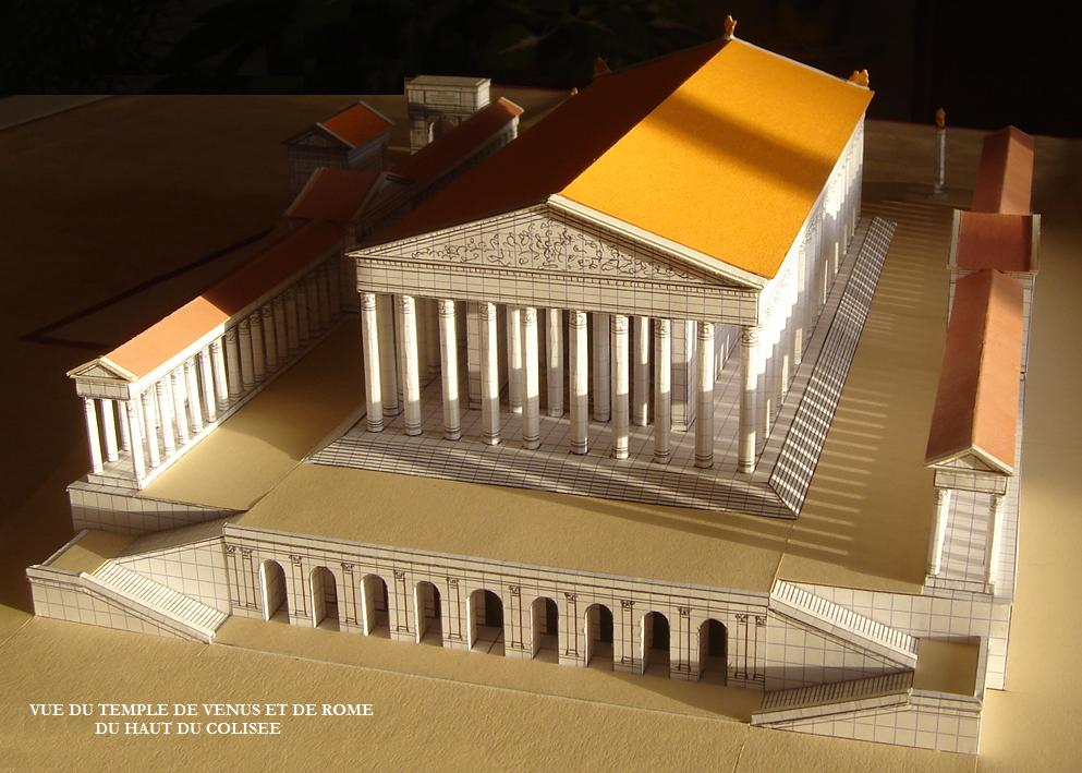 Description Reconstitution du Temple de Vénus et de Rome du côté du Colisée Date24 December 2009SourceOwn work by the original uploaderAuthorFranck Devedjian, né le 12 août 1981 à Clamart (92) franckdevedjian(at)hotmail(pt)com Reconstitution du Temple de Vénus et de Rome du côté du Colisée